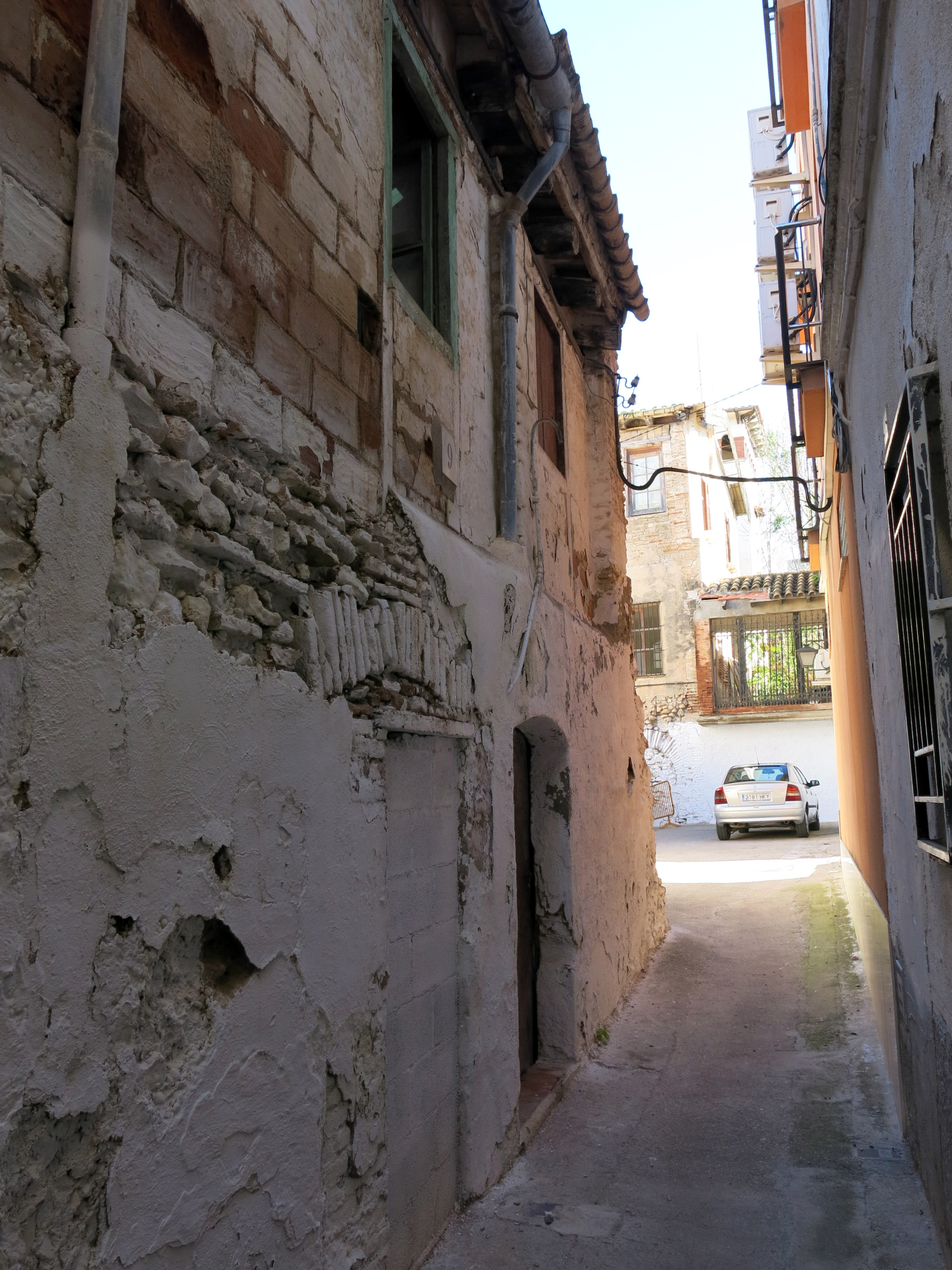 Habitatge al carrer de la Font de la Salut, 11-13 (Tortosa)